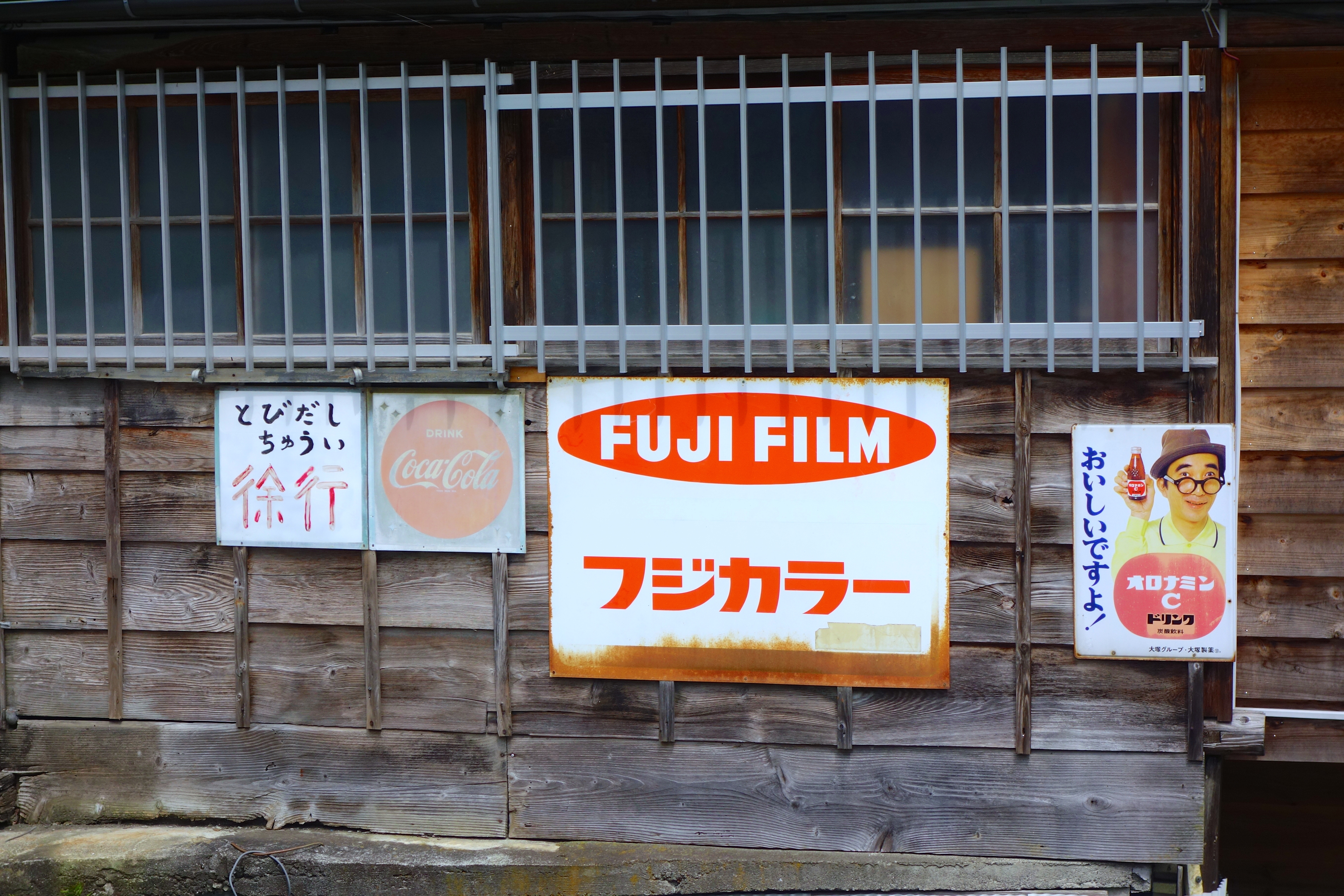 フジカラー オロナミンC